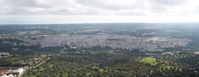 Fasano, Puglia látképe